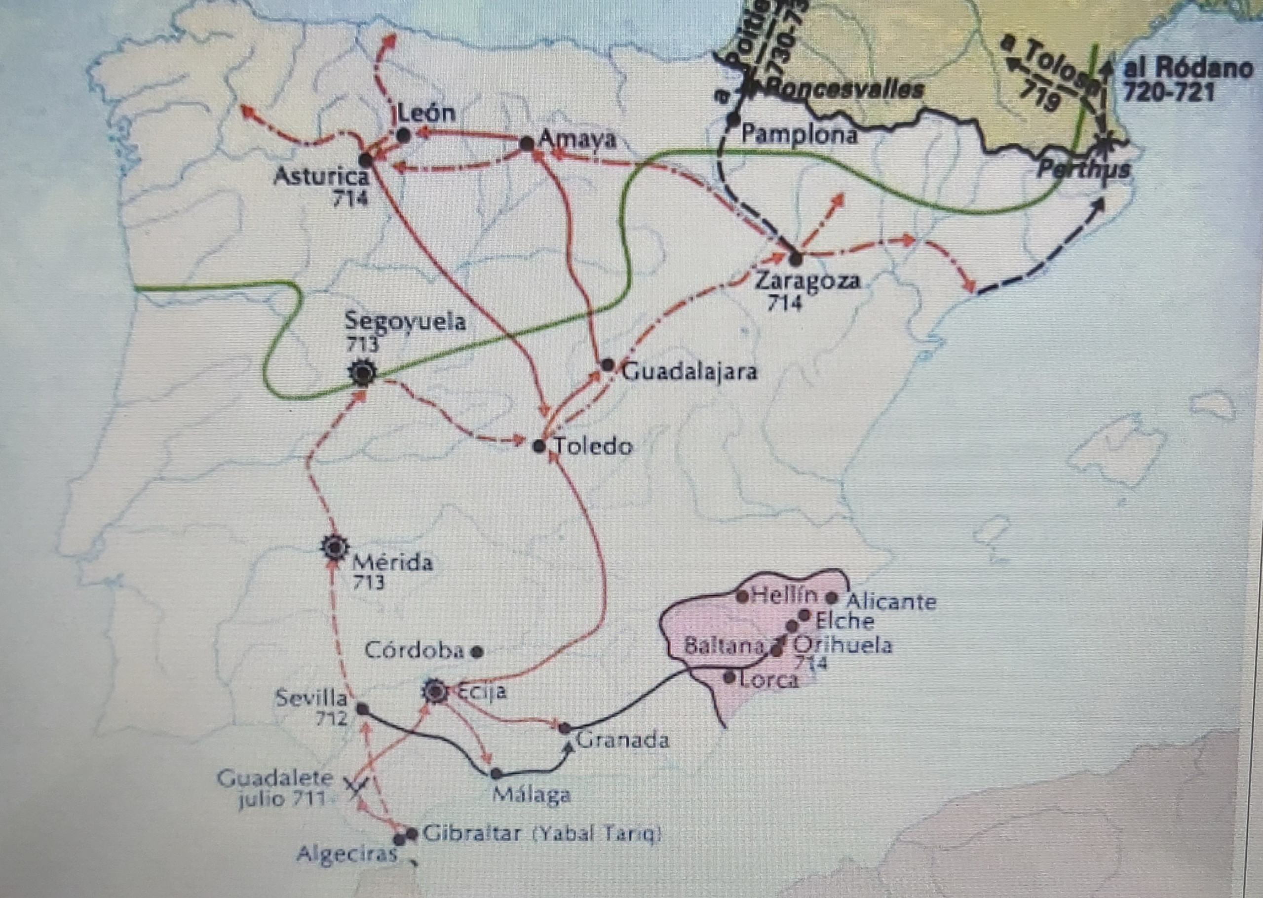 He afegit una fotografia de l'Islam en la Península Ibèrica